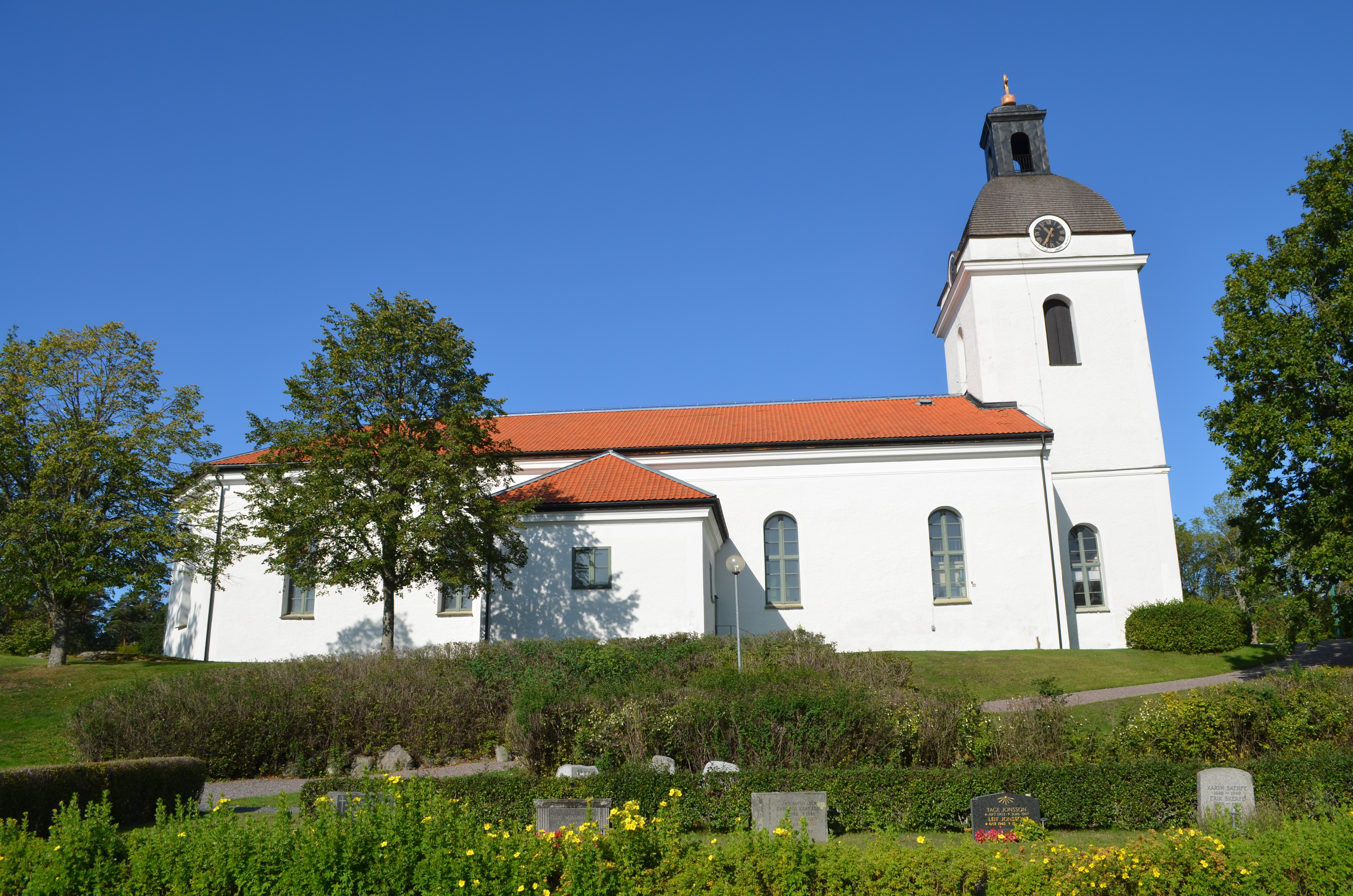 Gryts kyrka 2